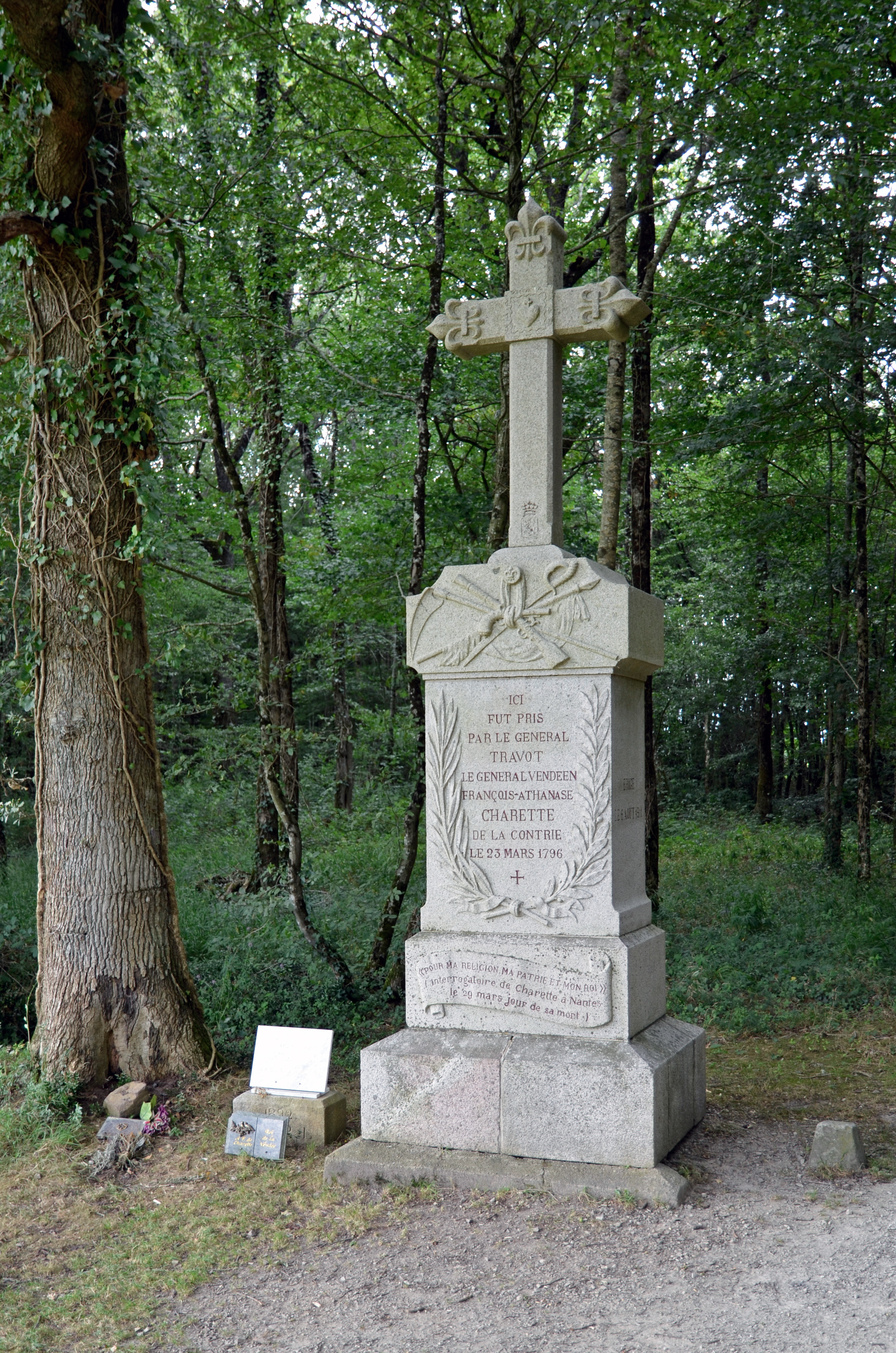 Croix de Charette dans le bois de la Chabotterie - Saint-Sulpice-le-Verdon, Vendée